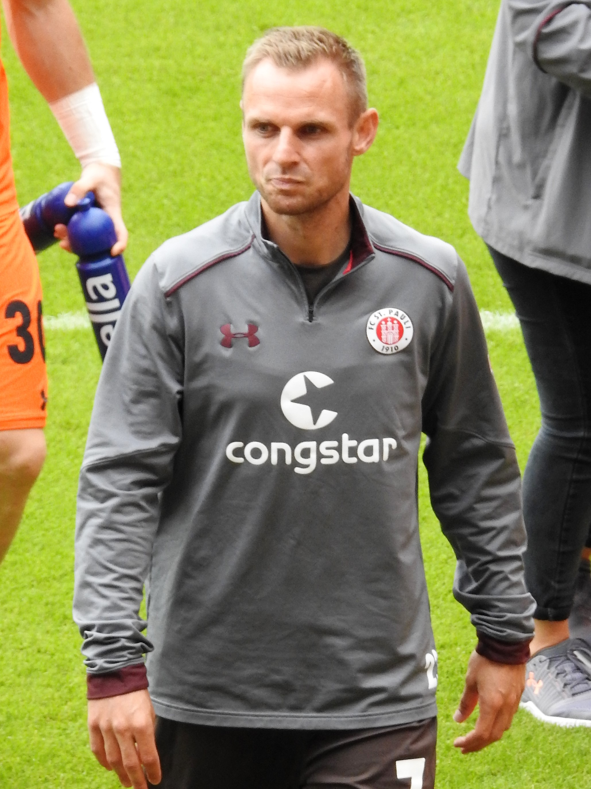 Bernd Nehrig FC St.Pauli